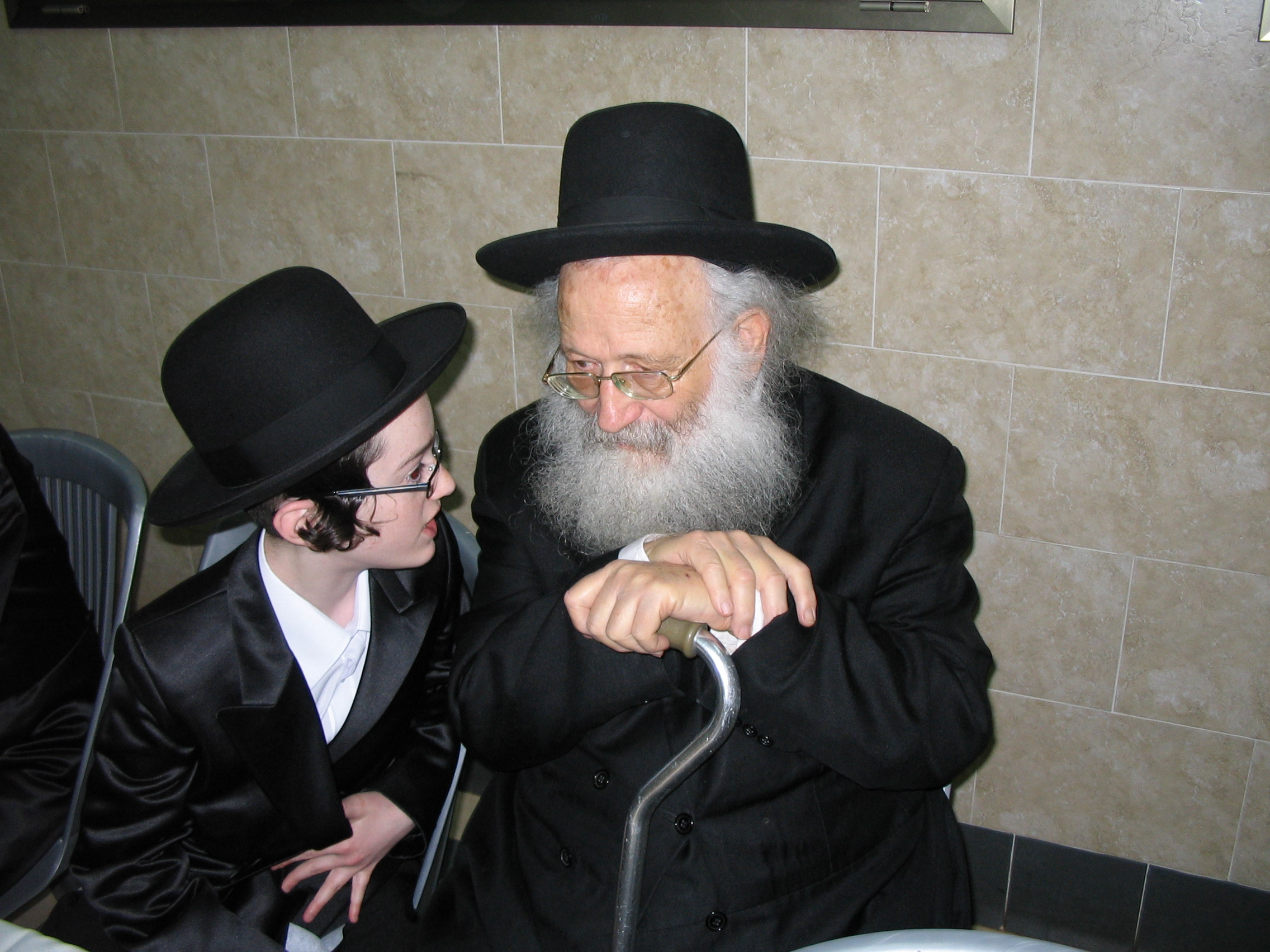 תמונה בפורים